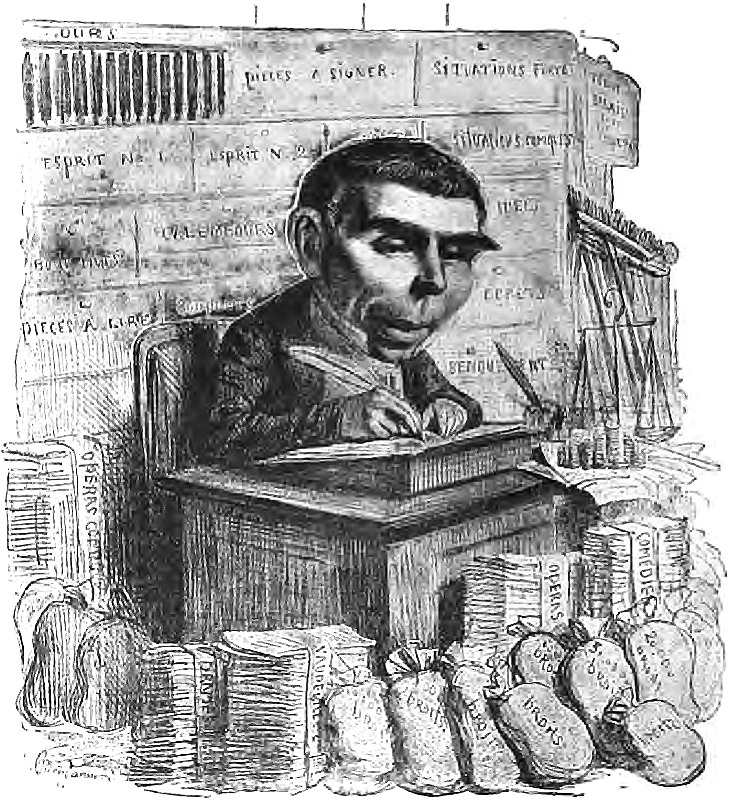 Eugène_Scribe,_célèbre_portrait-charge_de_Benjamin